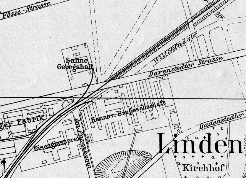 Stadtplanausschnitt. Zeigt u. a. die Saline Georgshall in Linden. This file has been extracted from another file: 1901 Stadtplan Hannover und Linden Klindworth's Verlag, Inhaber Berthold Pokrantz, Wagenerstraße 17, Karte.jpg